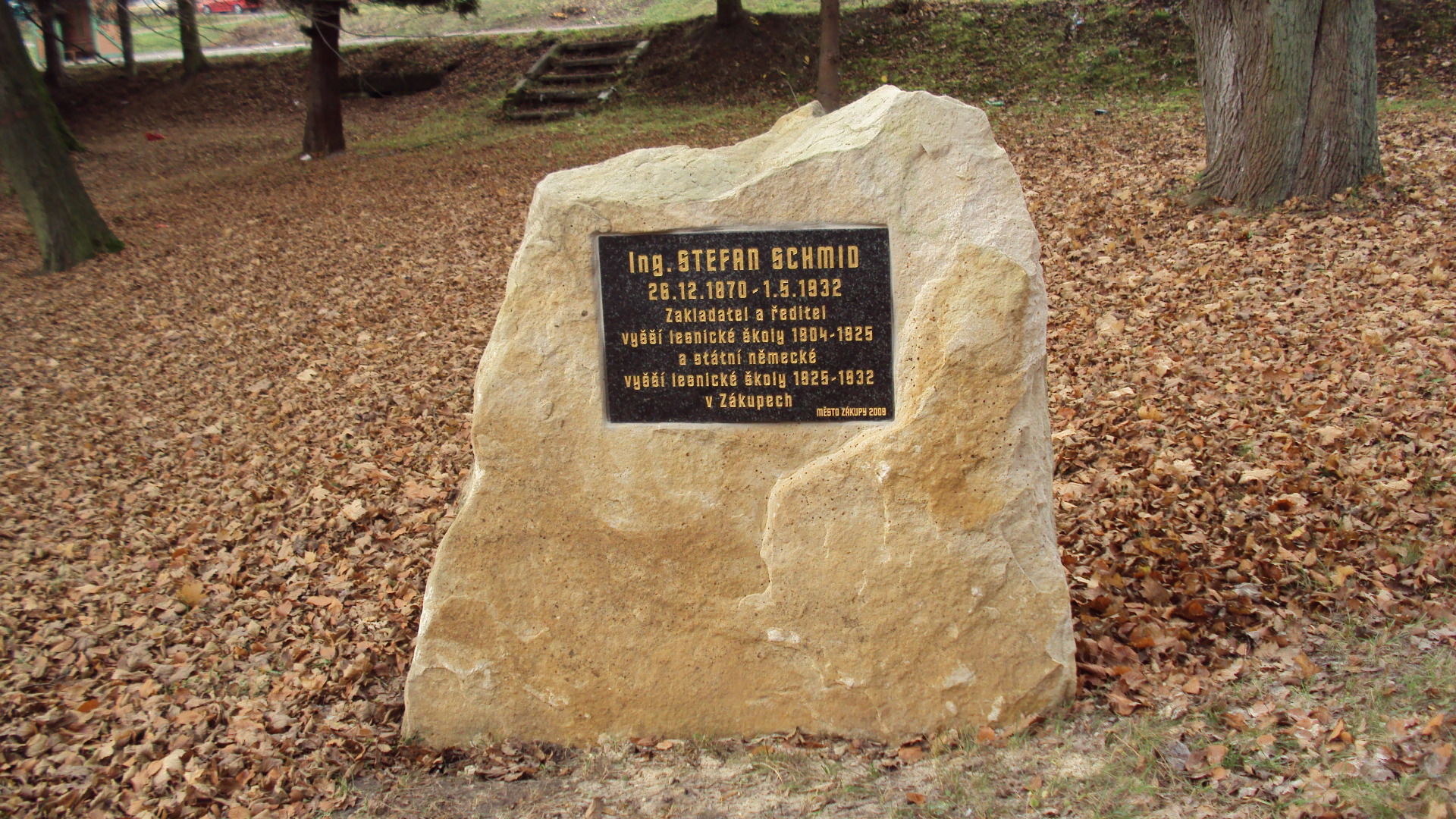 Pomníček ředitele lesnické školy ing Schmida v Nových Zákupech